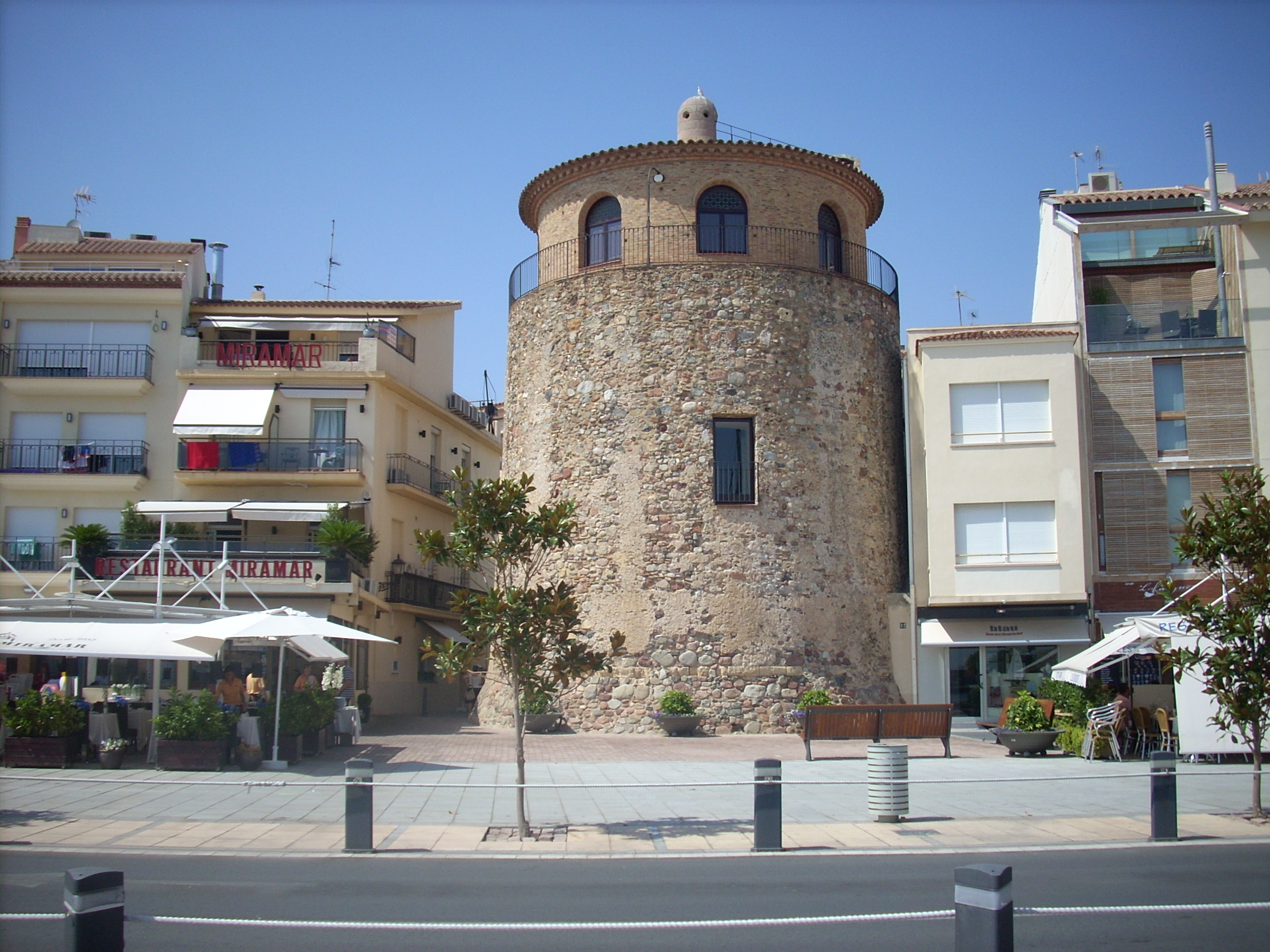 Cambrils, puerto